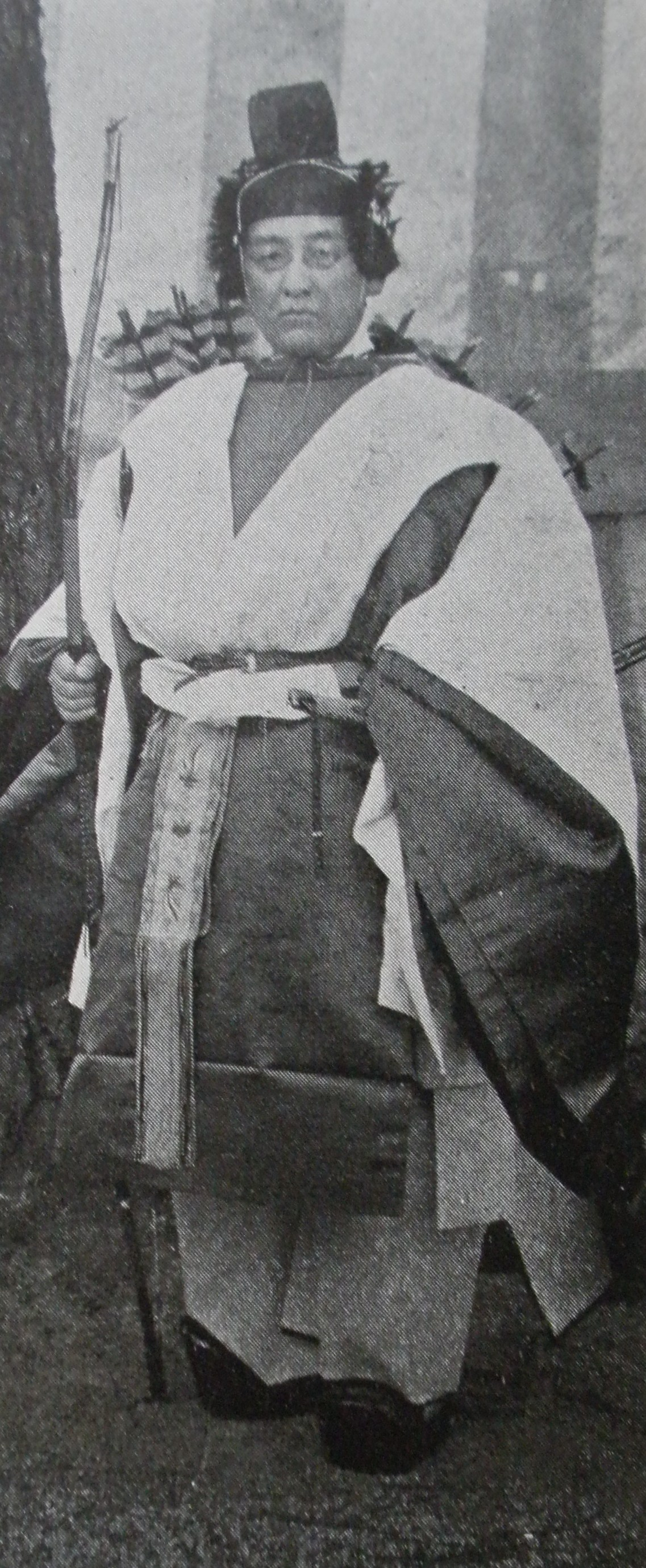 大礼使典儀官・貴族院書記官・男爵南光利